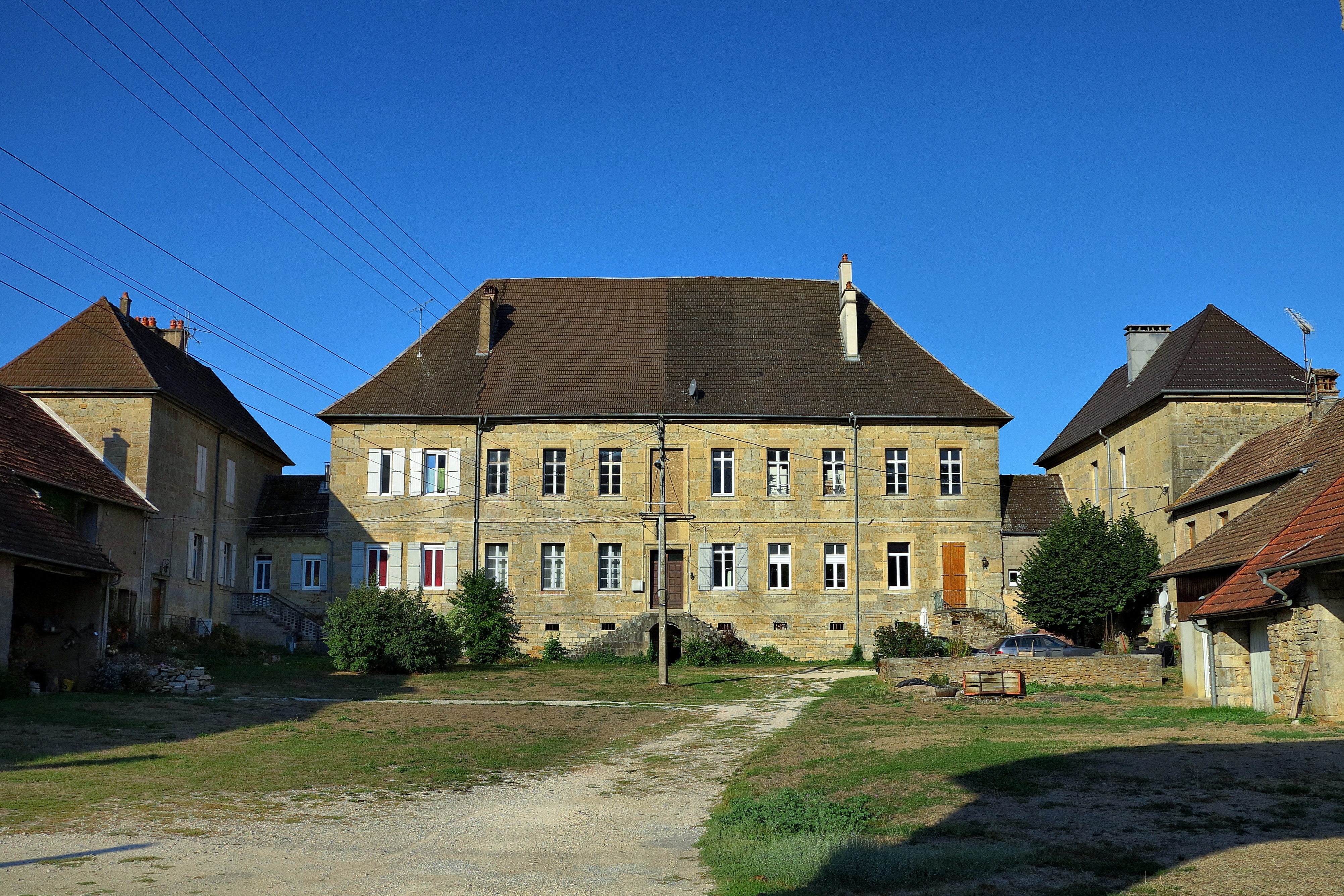 Le château de Gondenans-les-Moulins